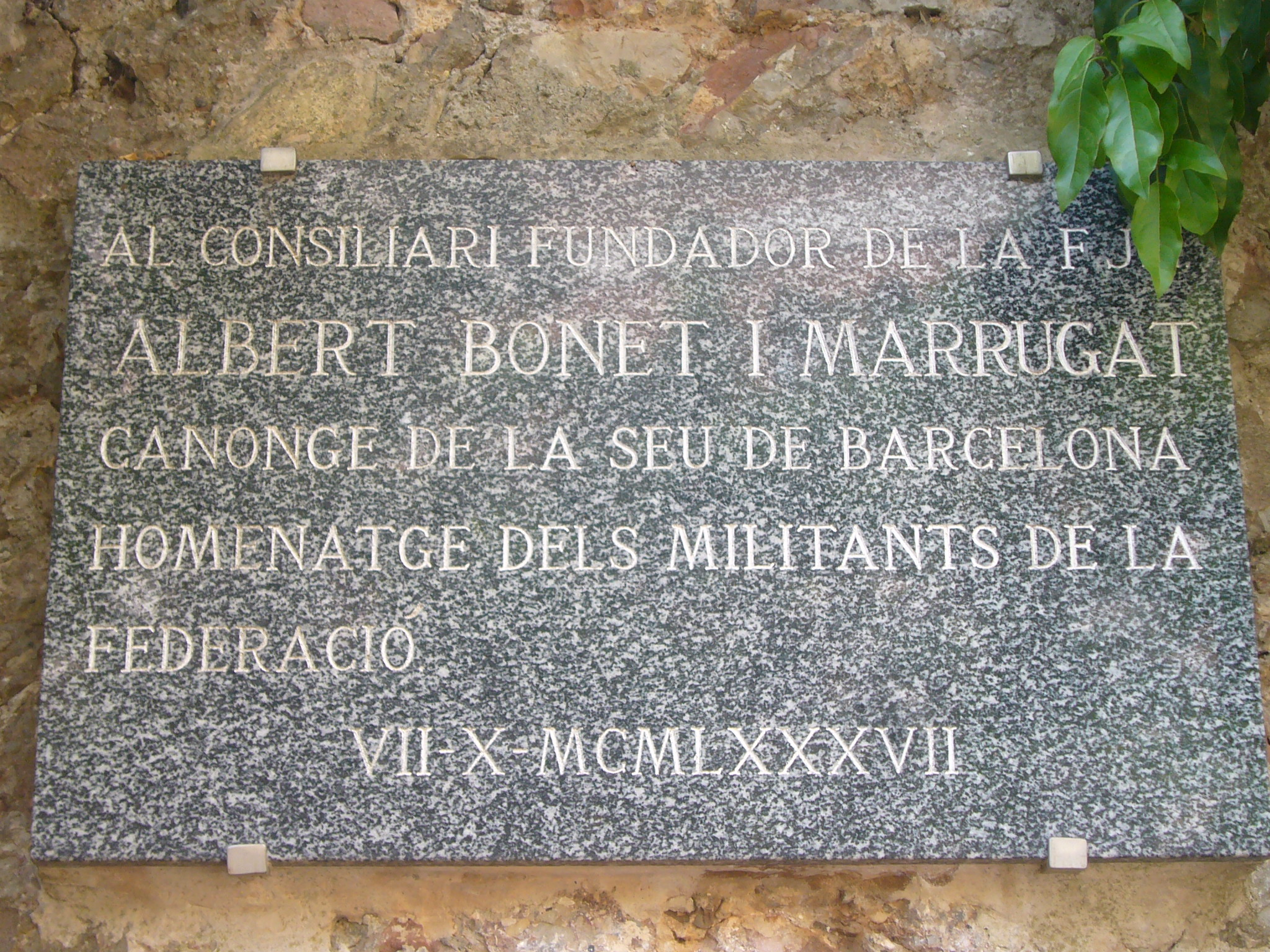 Placa del monument a Albert Bonet i Marrugat (camí de Sant Miquel - Montserrat)